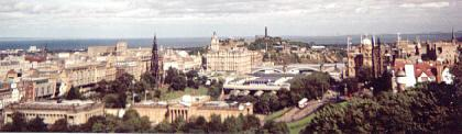 Zicht op Edinburgh vanaf Edinburgh Castle